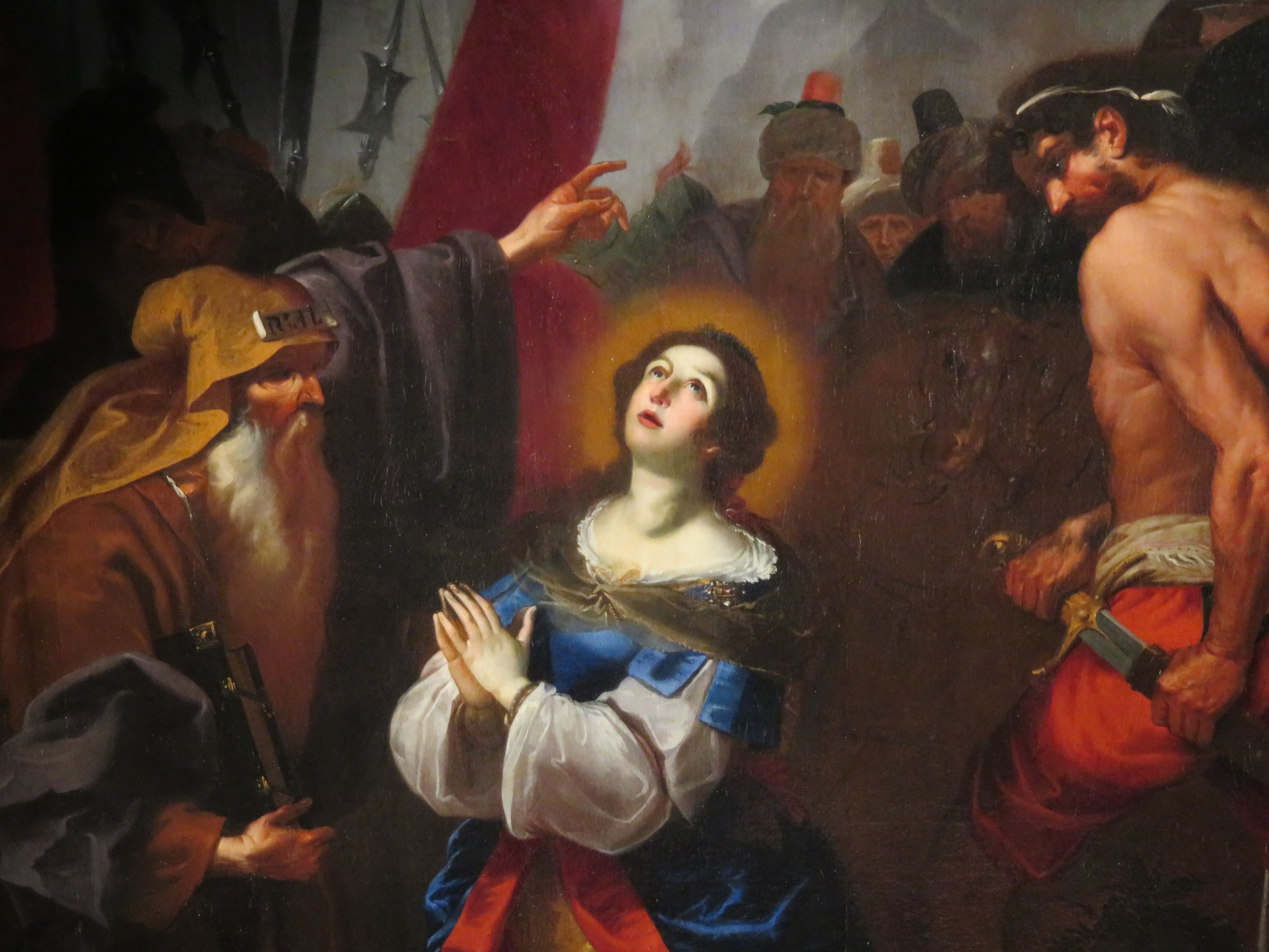 Pala nella chiesa di San Marco